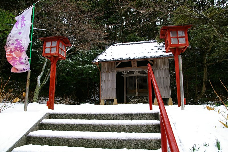 Shizuka Jinjya (Shrine), KyoTango-shi Amino, Kyoto, Japan.